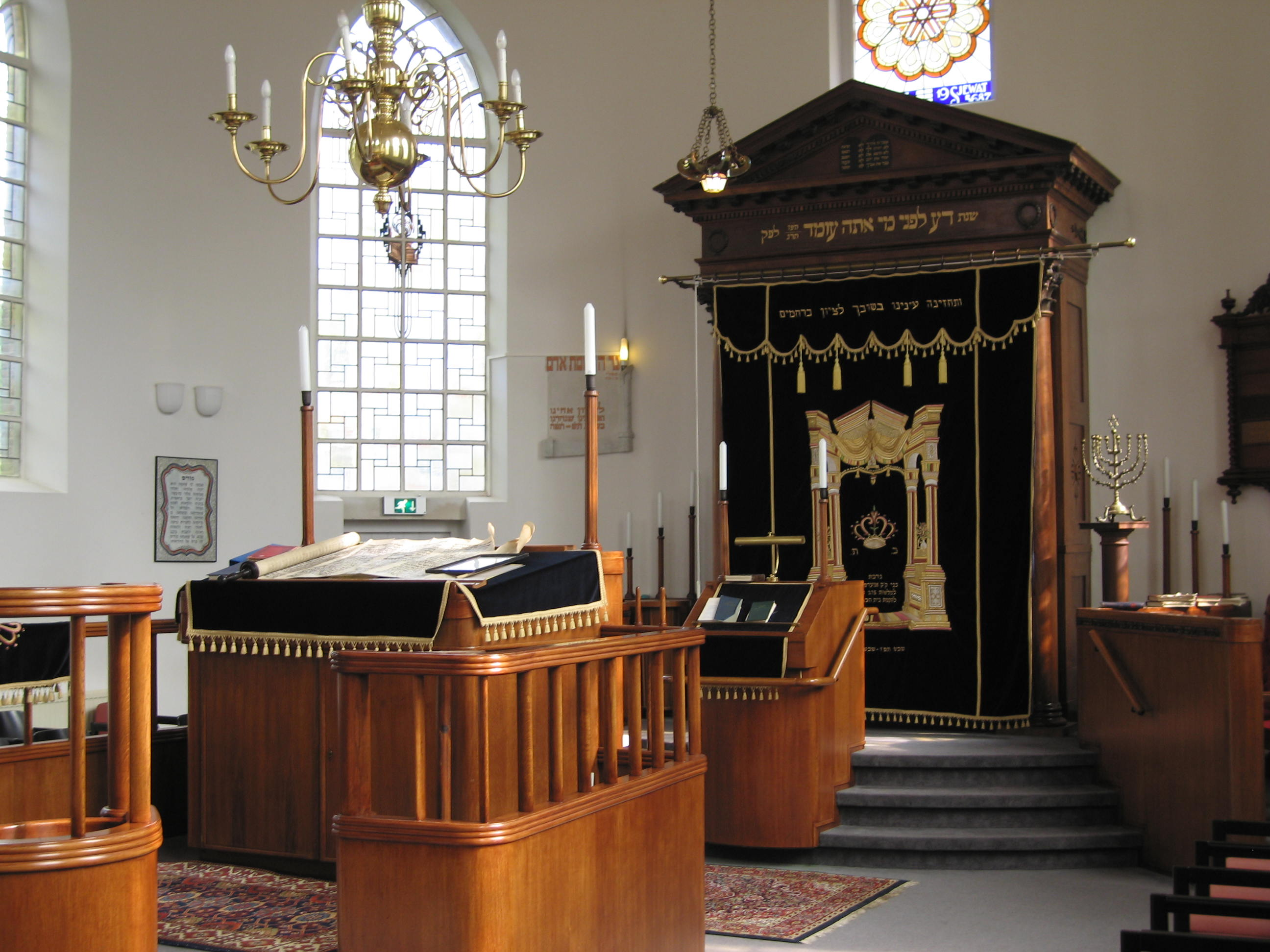 interieur; Synagoge der Ned.Israelitische Gemeente